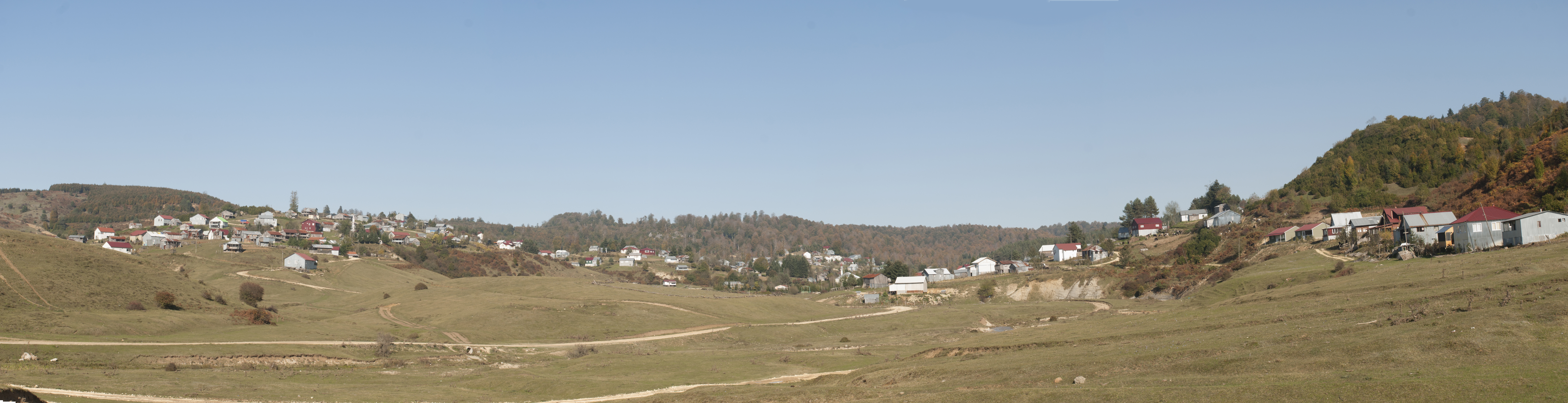 Sakarya ili, Akyazı ilçesi, Acelle Yaylası Panorama